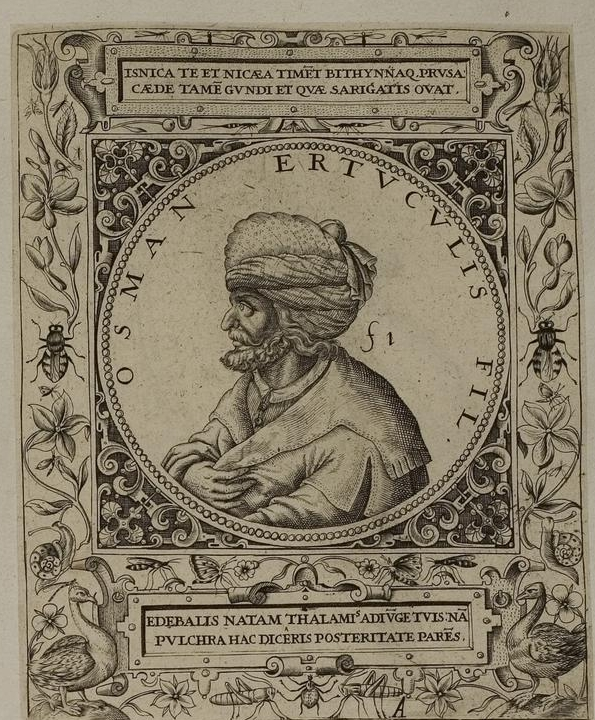 Grafik aus dem Klebeband Nr. 1 der Fürstlich Waldeckschen Hofbibliothek Arolsen Illustration aus: Georg Greblinger: Wahre Abbildungen der Türckischen Kayser vnd Persischen Fürsten / so wol auch anderer Helden und Heldinnen von dem Osman / biß auf den andern Mahomet. Johann Ammon, Frankfurt 1648 Motiv: "Osman Ertuculis fil." (= Osman I.)